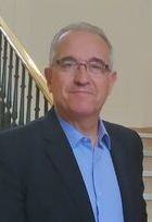 Foto de Enrique Maya, alcalde de Pamplona, durante una entrevista